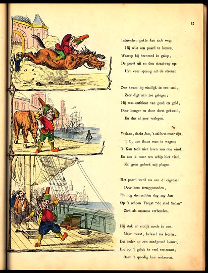 Illustratie van Jan Klaassen.